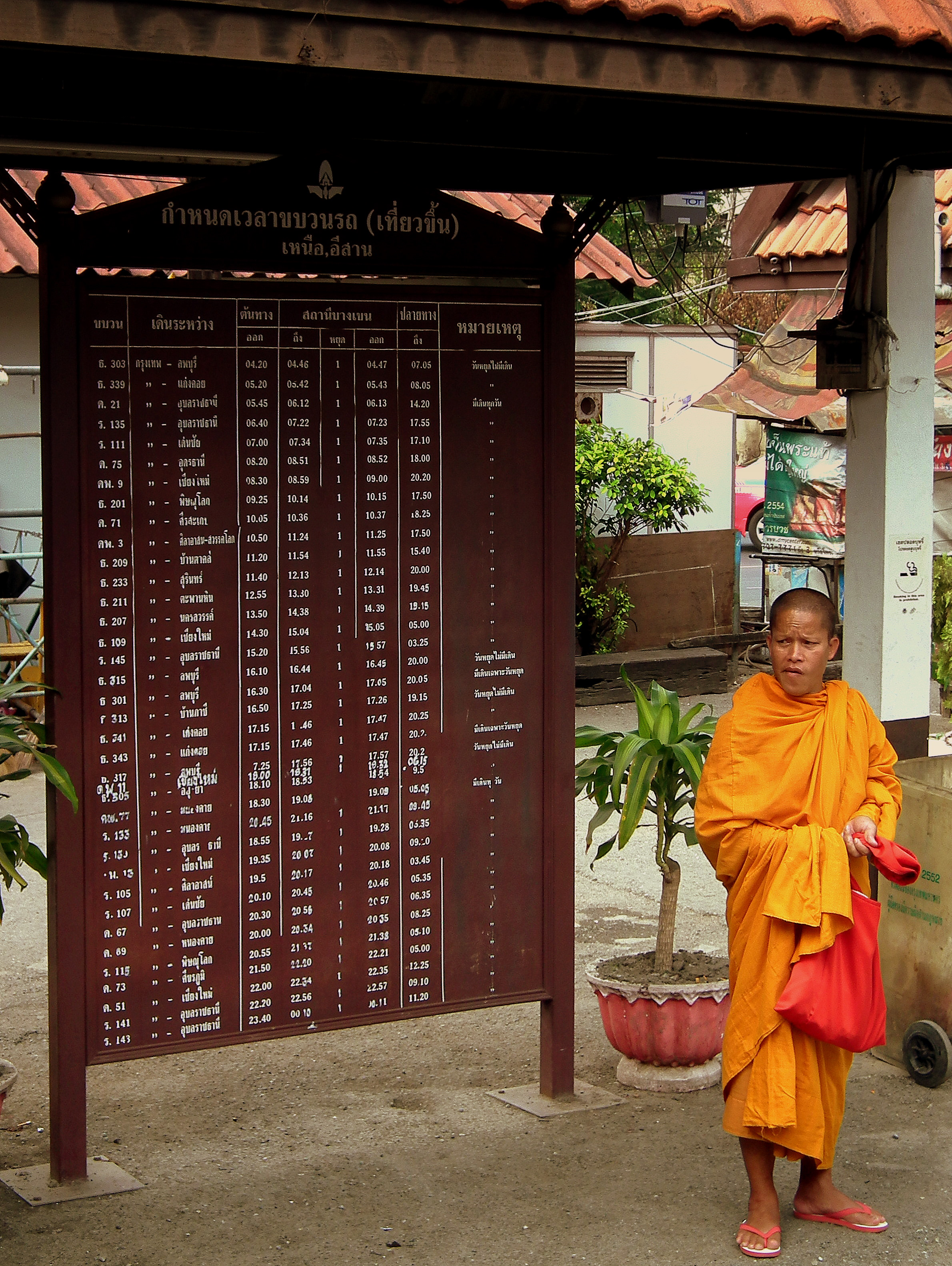 BUDDIST MONK AT AYUTTHAYA RAILWAY STATION JAN 2012